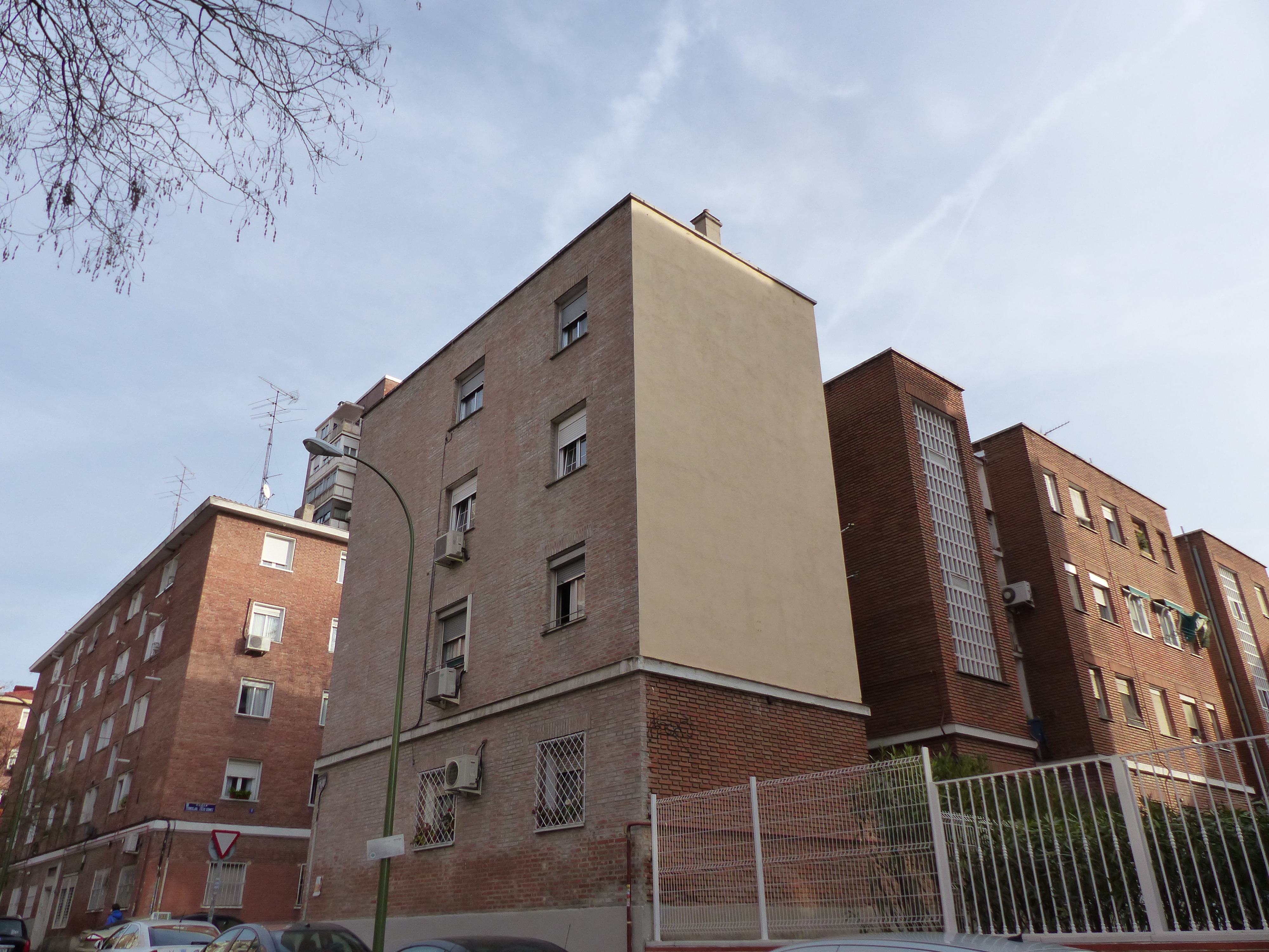 Arquitectura franquista en Quintana